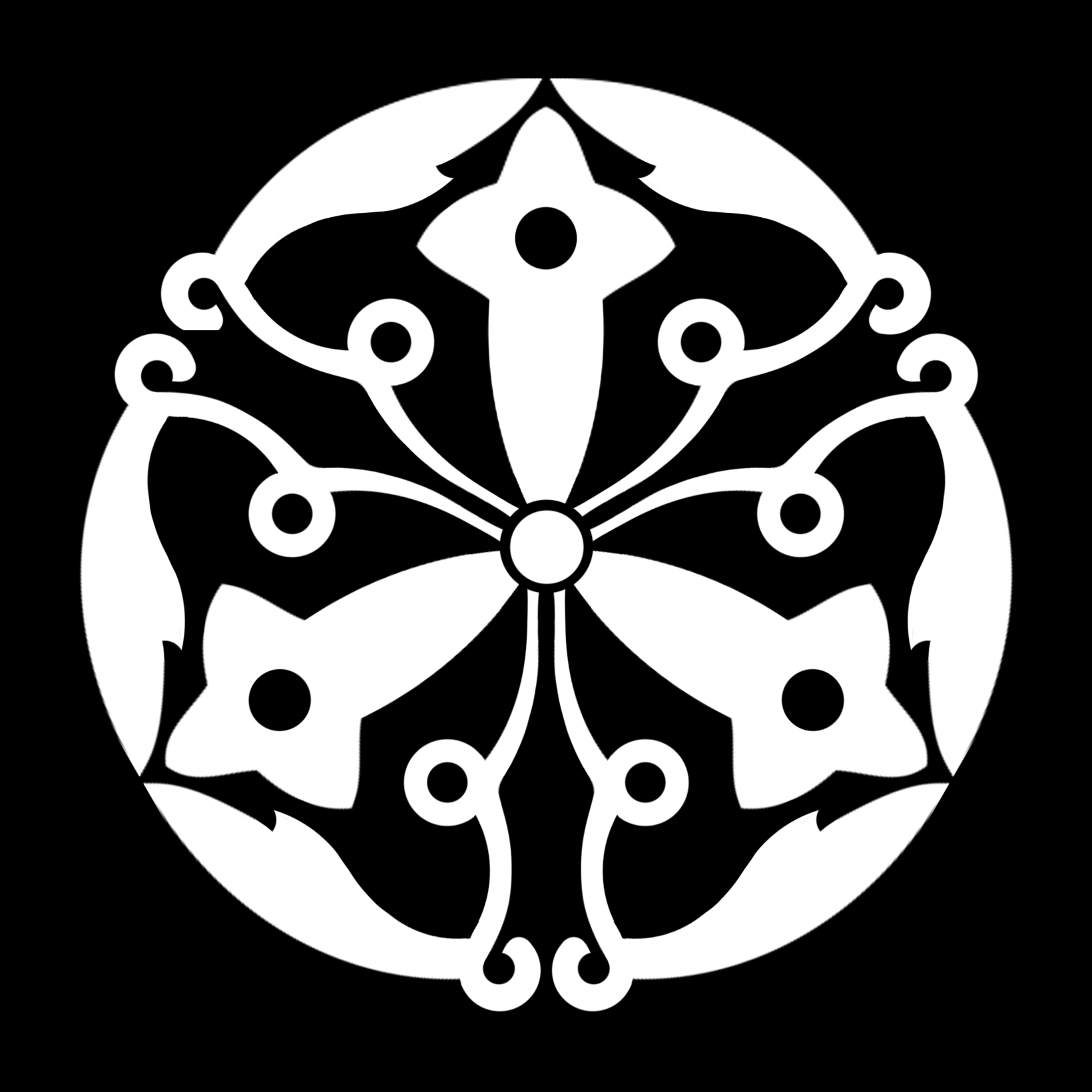 「正親町連翹」紋（染抜）